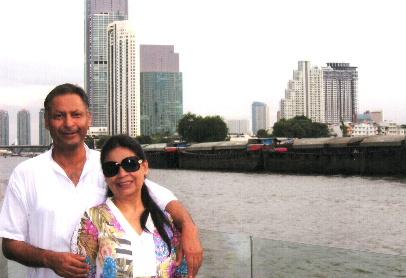 नेपाली: पत्नी उषा अधिकारीका साथमा कवि